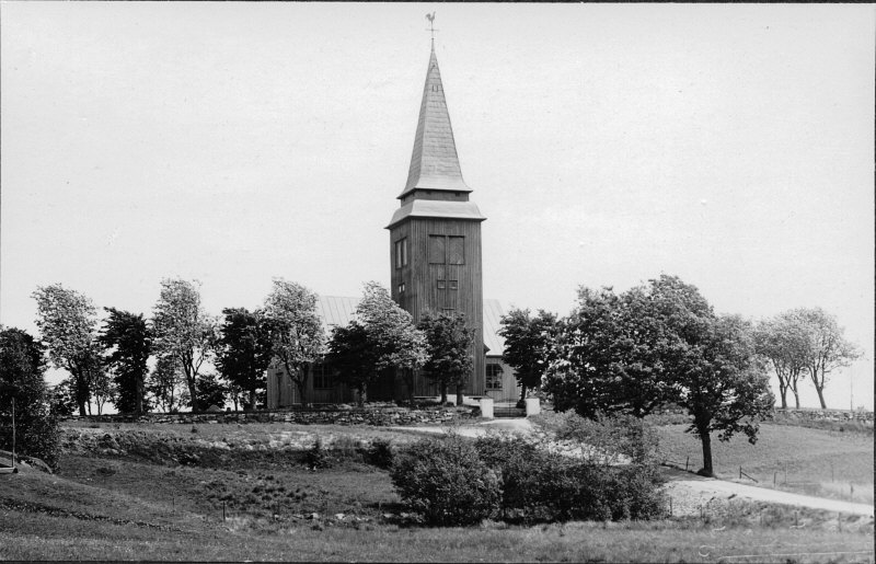 Kyrkan från söder. Efter 1940. Kategori: (01) ExteriörerKyrkan från söder. Efter 1940.